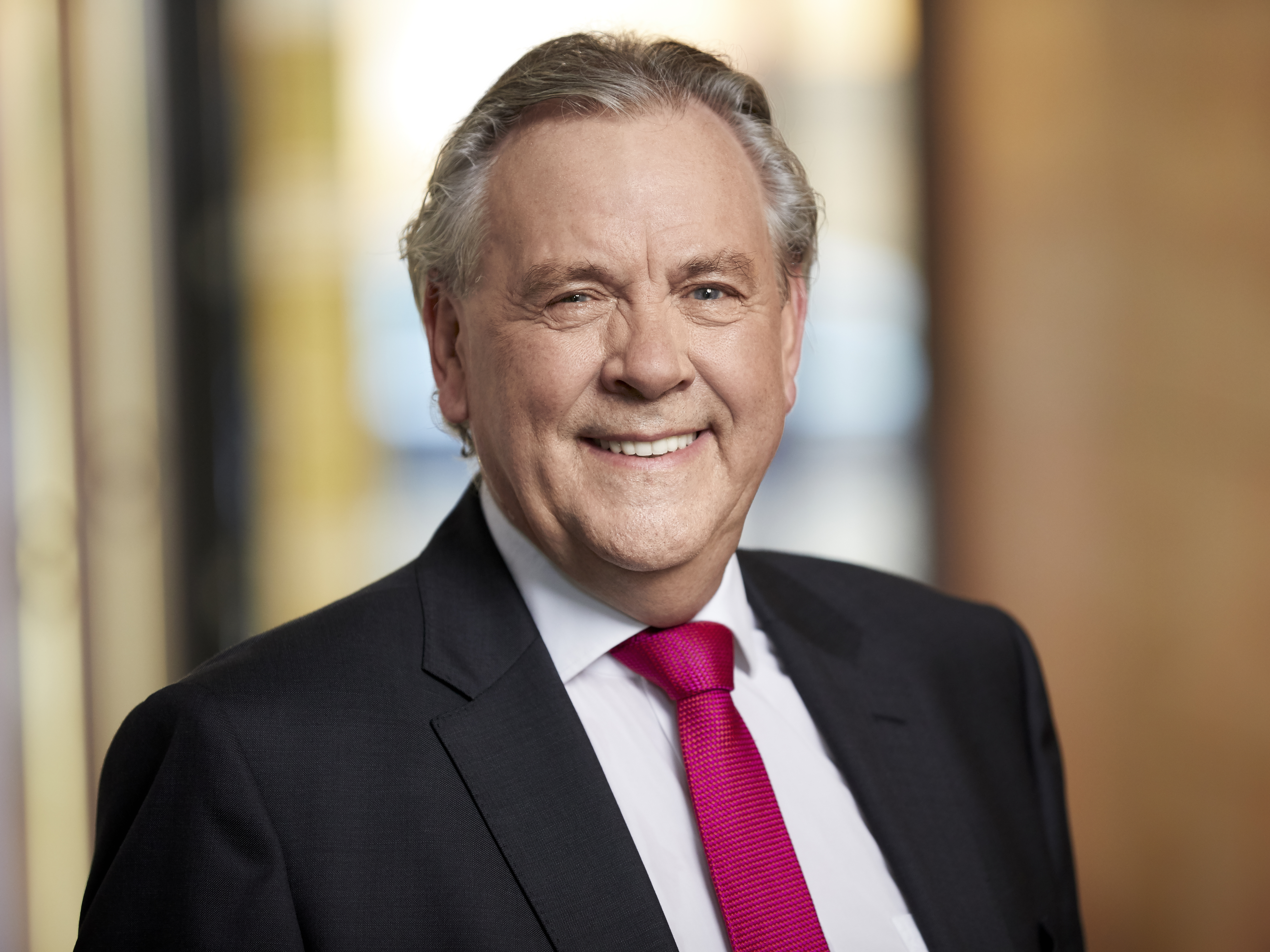 Albert Duin